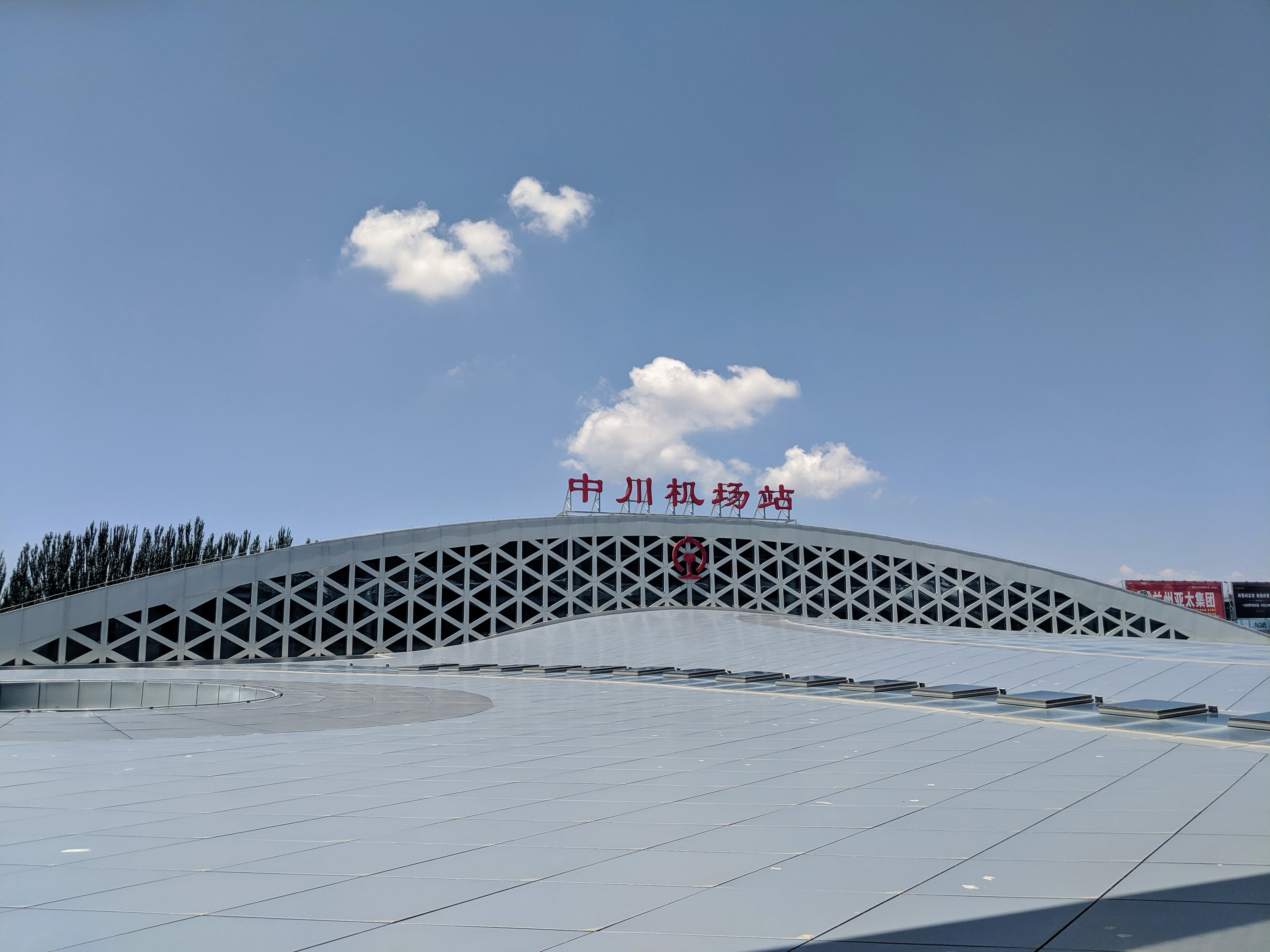 中川机场站